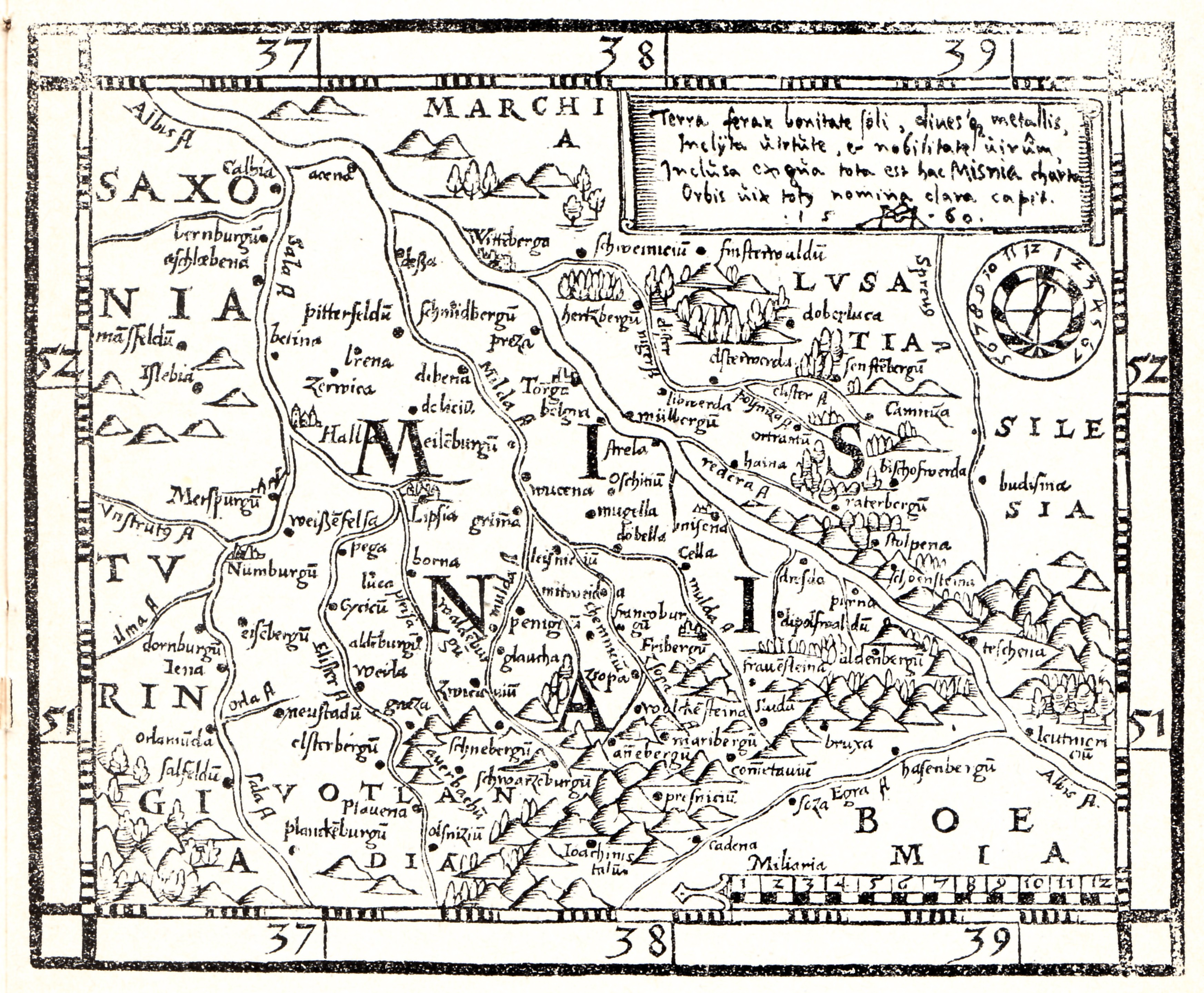 Die älteste Karte der Markgrafschaft Meißen, ein Holzschnitt von 134 Millimetern Breite und 122 Millimetern Höhe, schuf Hiob Magdeburg im Jahr 1560. Er monogrammierte und datierte seine Arbeit oben rechts. In Latein beschriftete er sie und nannte sie Misnia charta. Karte in der Deutschen Digitalen Bibliothek